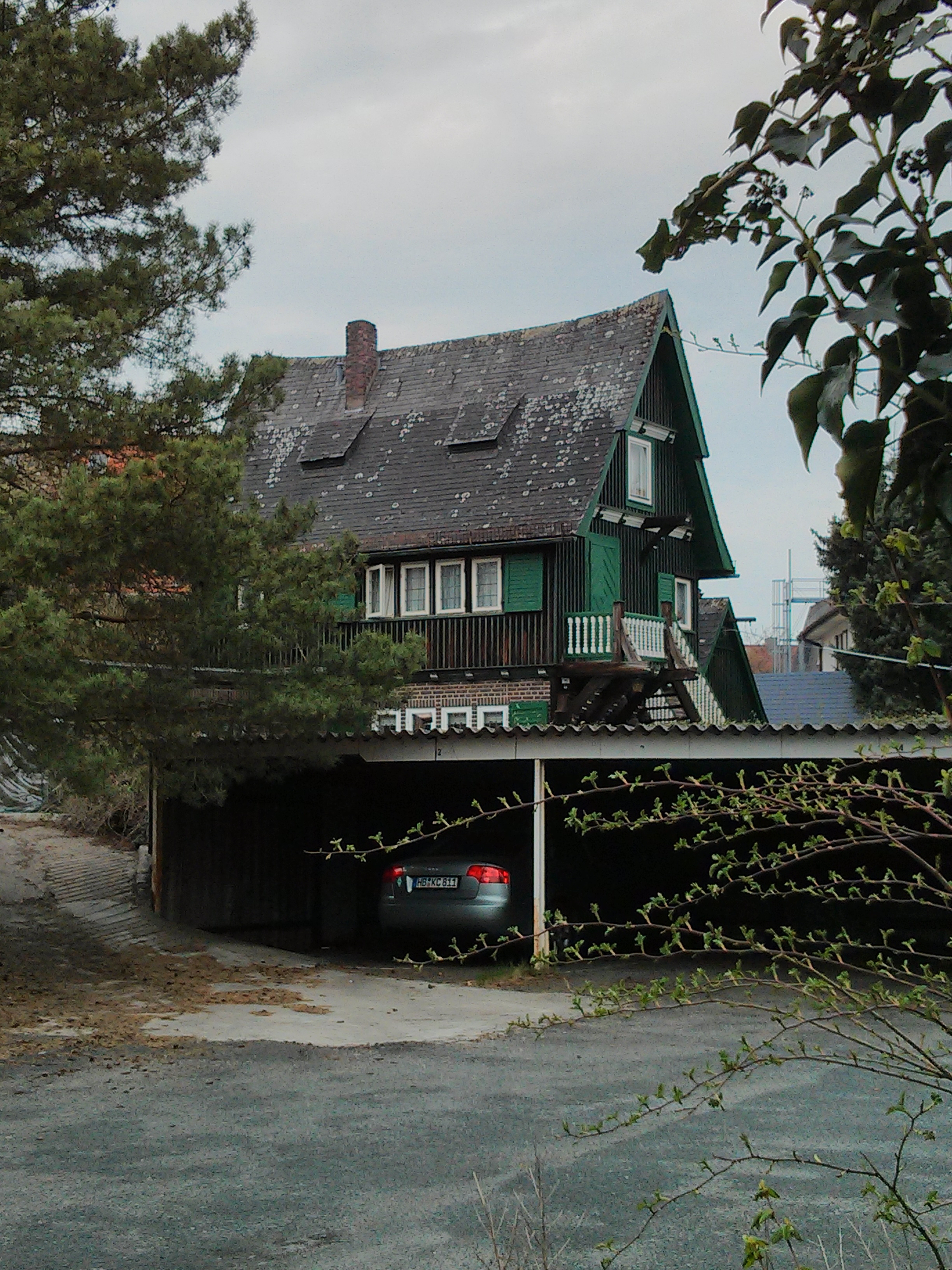 Haus Runge in Bremen, Kirchbachstraße 213A Das abgebildete Objekt ist ein geschütztes Kulturdenkmal in der Freien Hansestadt Bremen, mit der Nr. 0671 beim Landesamt für Denkmalpflege registriert.